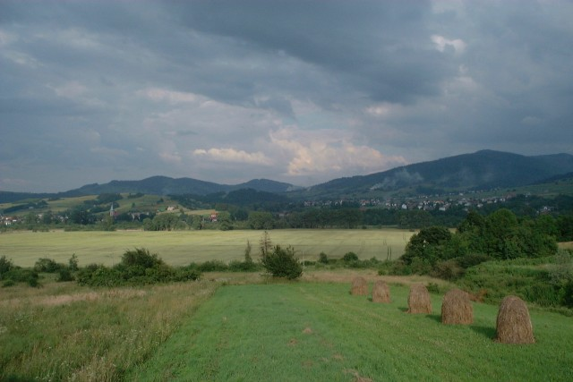 Poland, Bystra village.